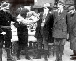 Fotogramma del cortometraggio muto Zagomar contro Nick Carter, regista Victorin H Jasset, prod Eclair, Paris, 1912